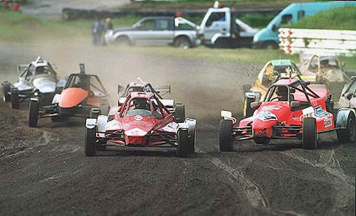 Autocross: Finale der Spezial-Crossfahrzeuge bei einem DMSB-DM-Lauf in Buxtehude 2004 Michael Höse (webmaster von rallycross-loete.de) hat die Bilder eingestellt, ich denke das diese 3 Bilder am besten den Tourenwagen und Spezialcross-Charakter des Autocross-Sports trffen - leider fhelen mir gute Bilder der Super/Spezialtourenwagen.